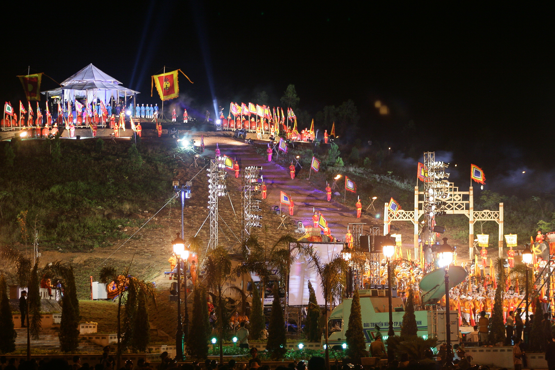 Tái tạo hình ảnh vua Quang Trung Nguyễn Huệ lên ngôi tại Núi Bân, Huế